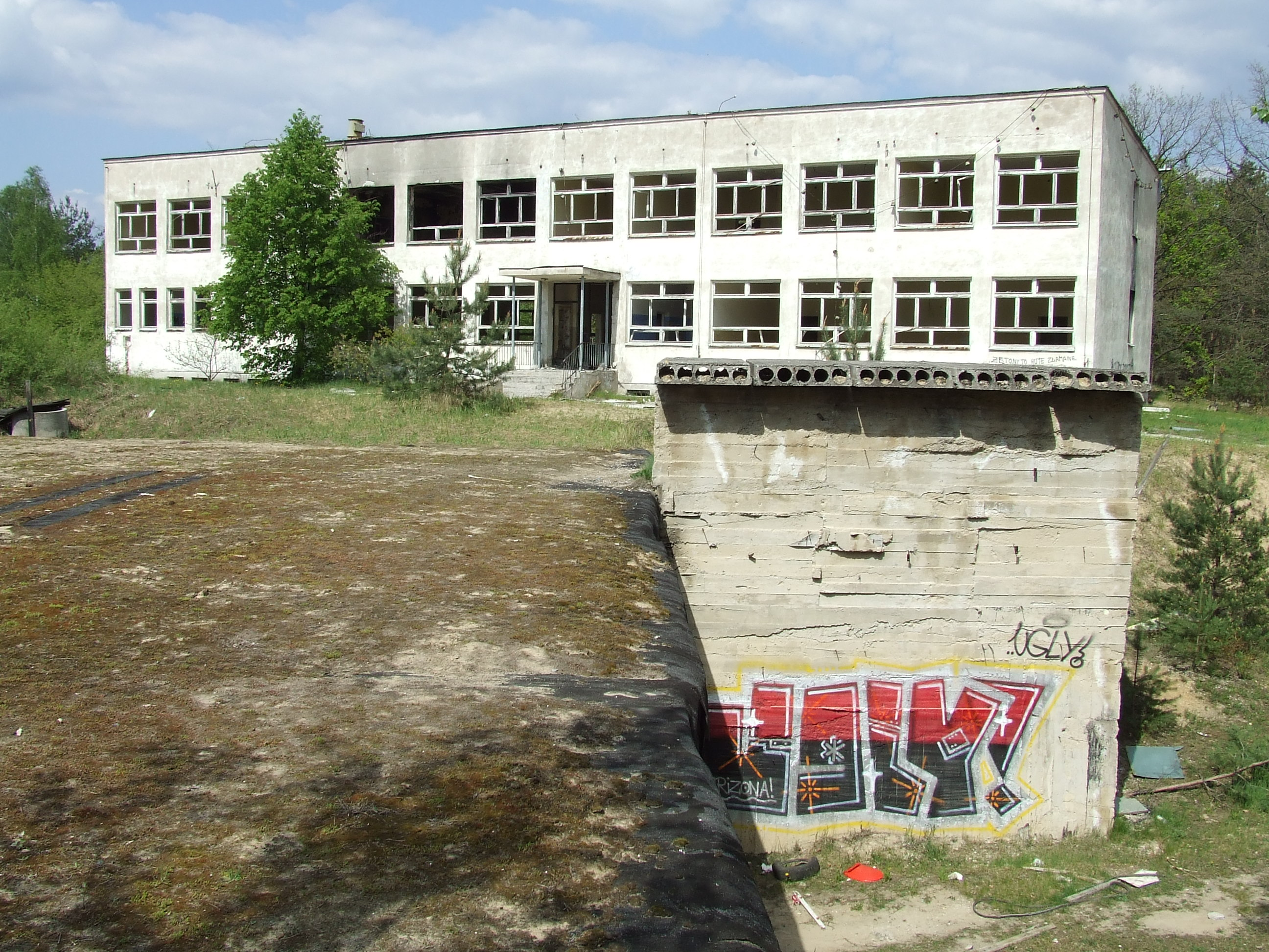 Atomowa Kwatera Dowodzenia, Dąbrowa Leśna, obiekt nr 2 w tle, i wejście do 3